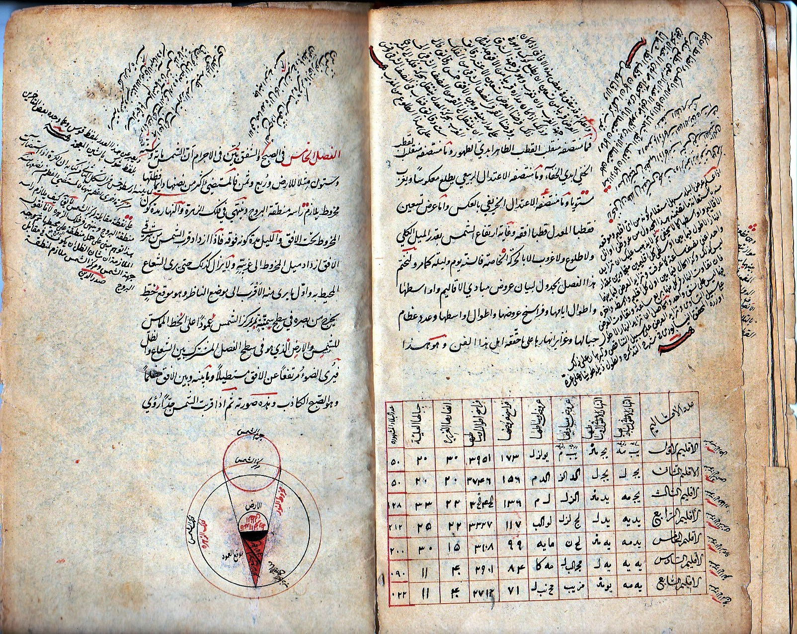 صفحة من كتاب (تشريح الأفلاك) في علم الهيئة، من تأليف بهاء الدين العاملي وعلى غلاف الكتاب ختم واهداء الشيخ نعمان خير الدين الآلوسي إلى استاذهِ وشيخه ملا قاسم أفندي المفتي عام 1273هجري/ 1856م، في بغداد